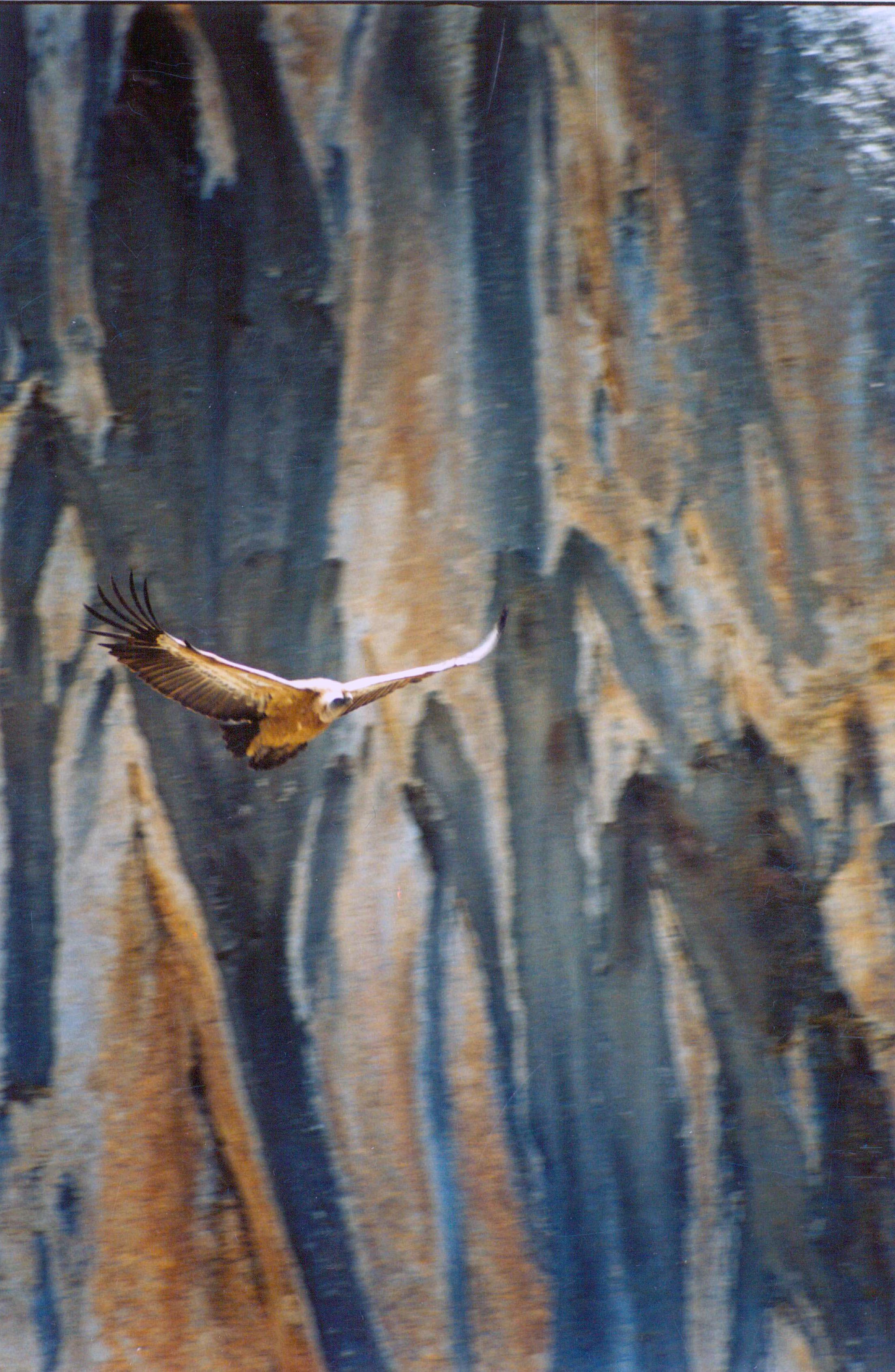 Gyps fulvus